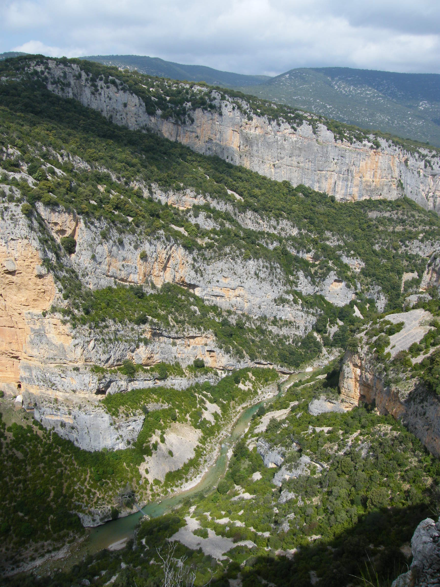 Vue plongeante, depuis le mirador de San Martín del Alcandre, sur le río Alcandre (amont à droite de la photo, aval à gauche). Une voie équipée de chaînes, permet, sur la gauche, de descendre jusqu'au pont métallique visible dans le coin inférieur gauche de l'image ; la traversée de l'Alcanadre (sur le pont, ou dans l'eau en amont) permet de rejoindre l'Ermita de San Martín, visible à l'extrème gauche de l'image, dans le tiers bas.